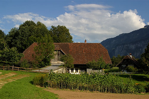 Freilichtmuseum Ballenberg